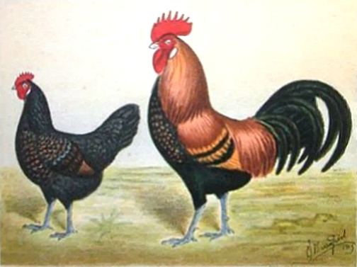 Afbeelding van een Drents hoen in de oude kleurslag goudlaken